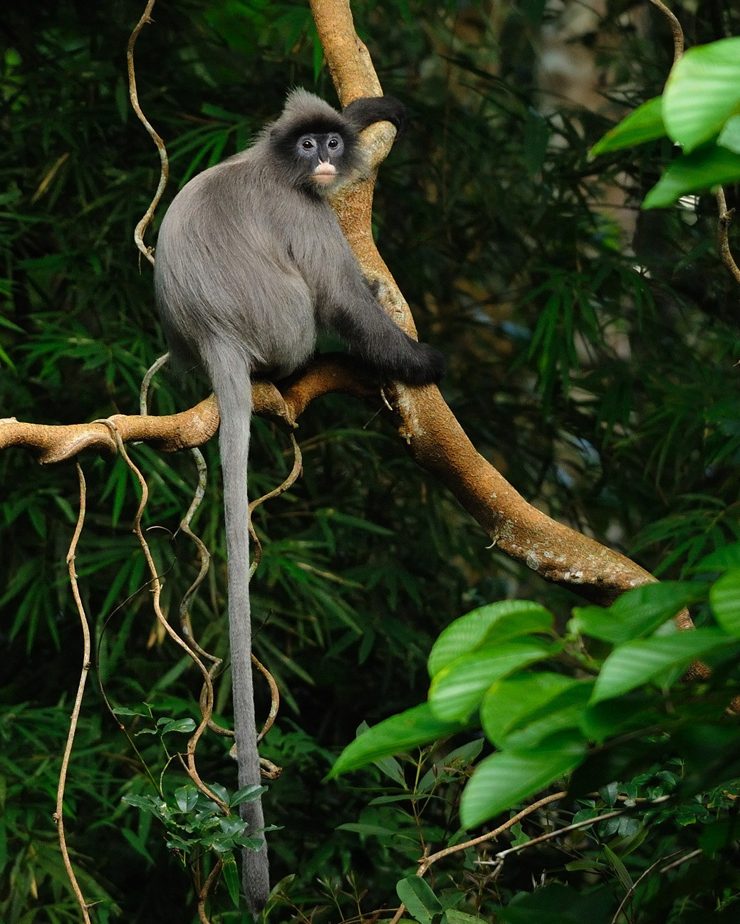 Trachypithecus phayrei, Blyth, 1847.